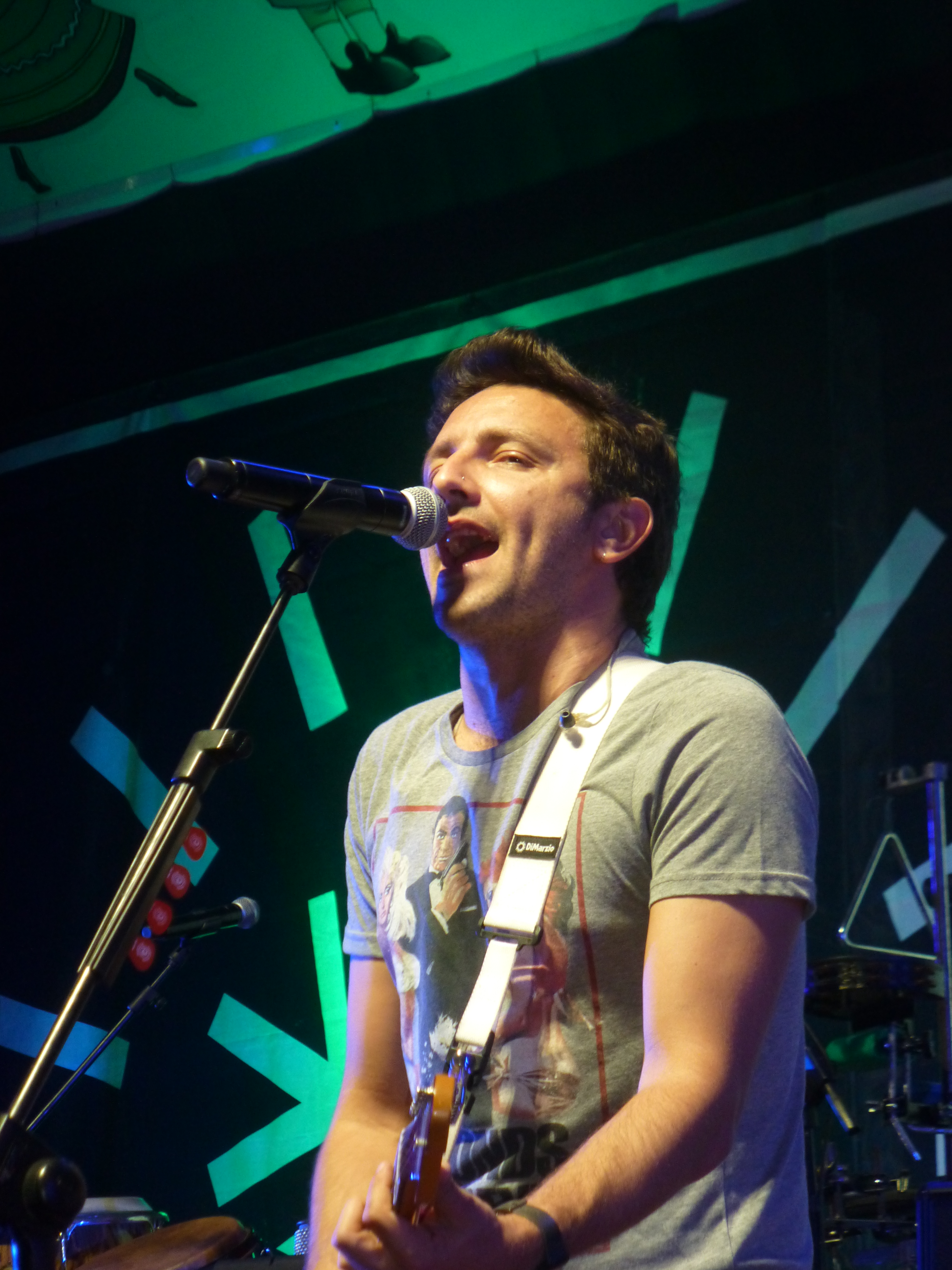 Emiliano Brancciari en el concierto de No Te Va Gustar (NTVG) durante la XXXIV Fiesta Nacional del Inmigrante en la ciudad de Oberá, Misiones. Agradecimiento a la Federación de Colectividades por la gentileza de acreditar a Wikimedia Argentina como medio de prensa durante la realización de la Fiesta del Inmigrante.